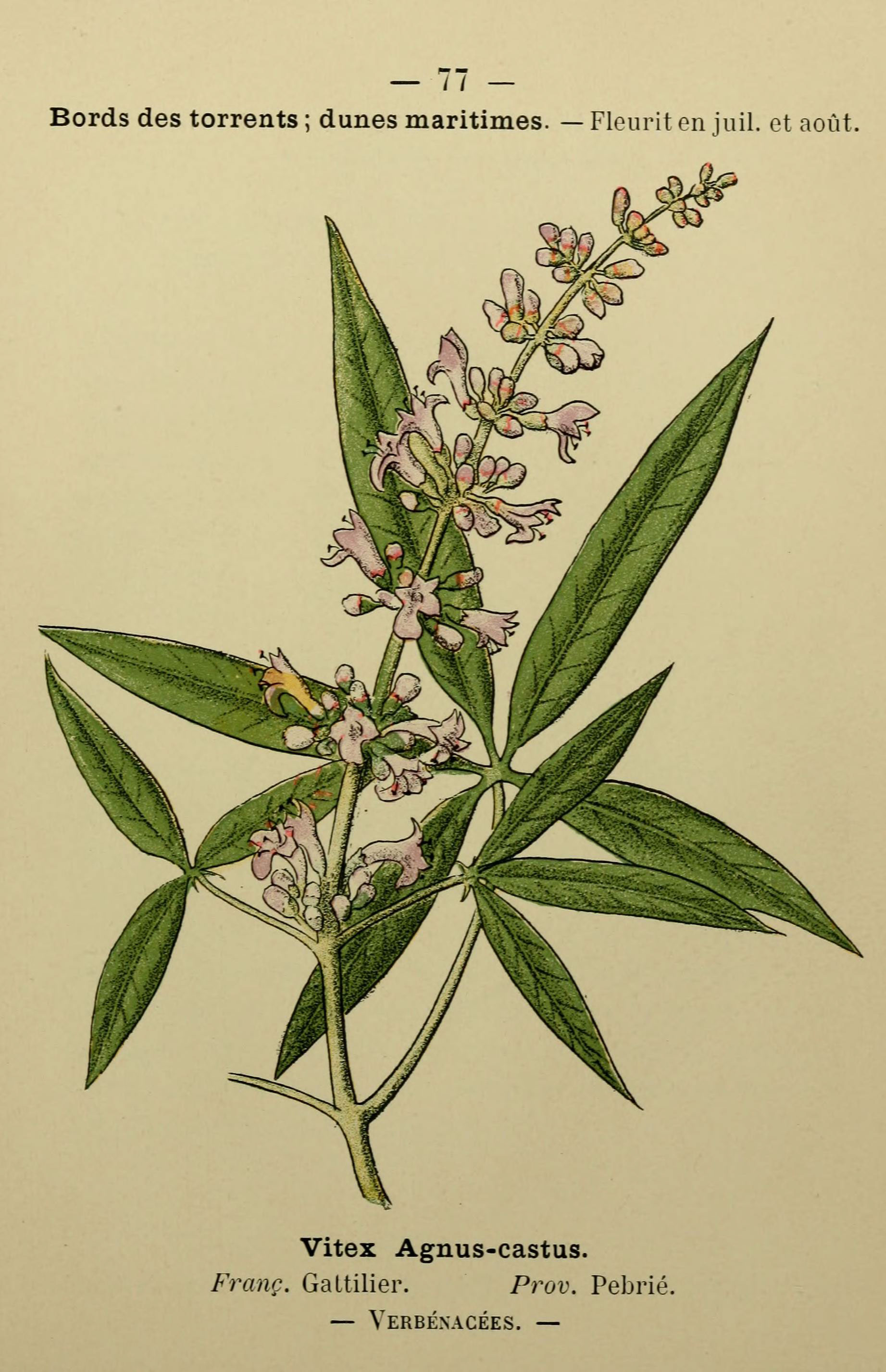 — / / Bords des torrents ; dunes maritimes. — Fleurit en jiiil. et août. Vitex Agnus-castus. Franc. GaLtilier. Prov. Pebrié. — Verbénacées. —